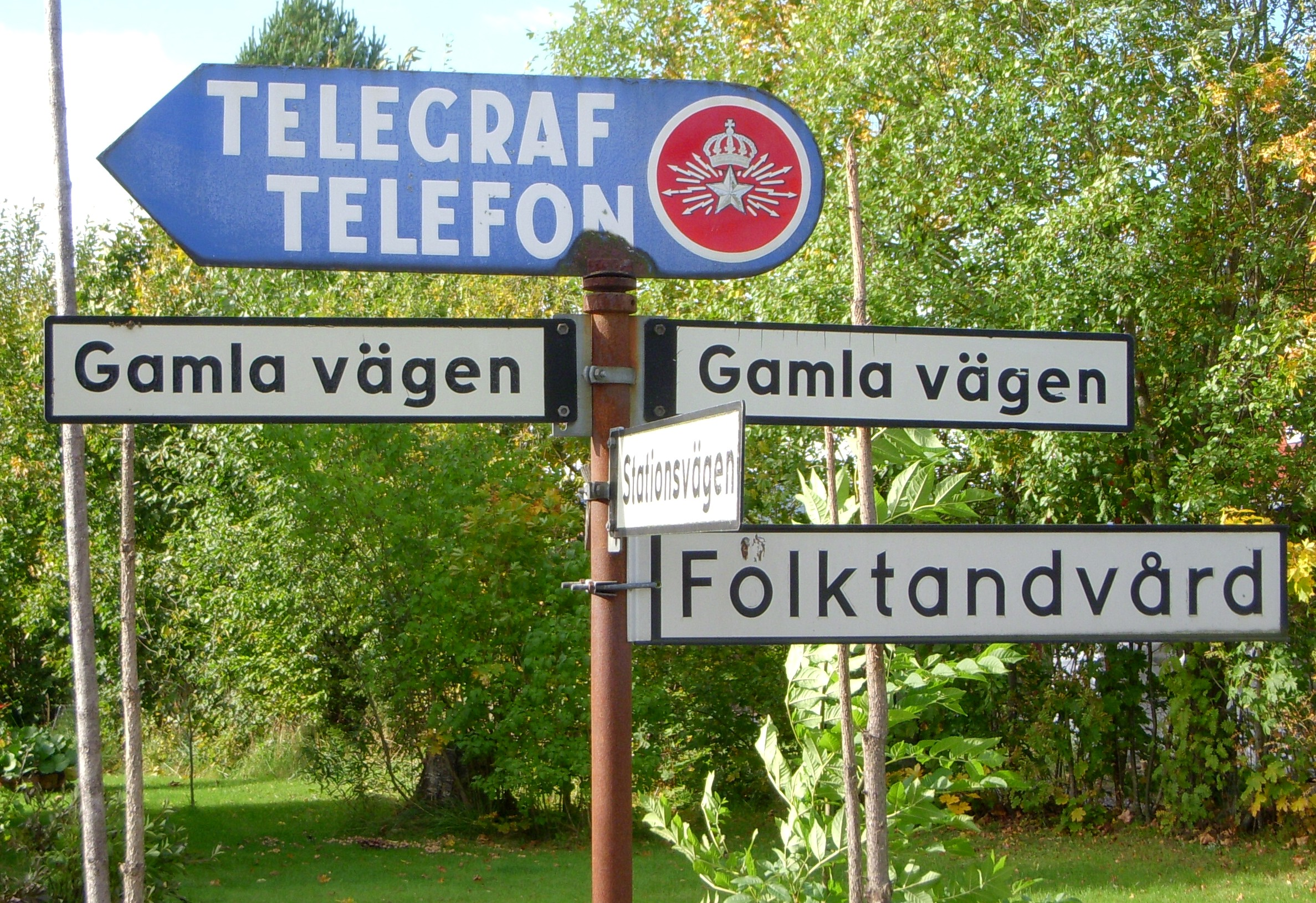 Vägskyltar i Grangärde, Dalarna